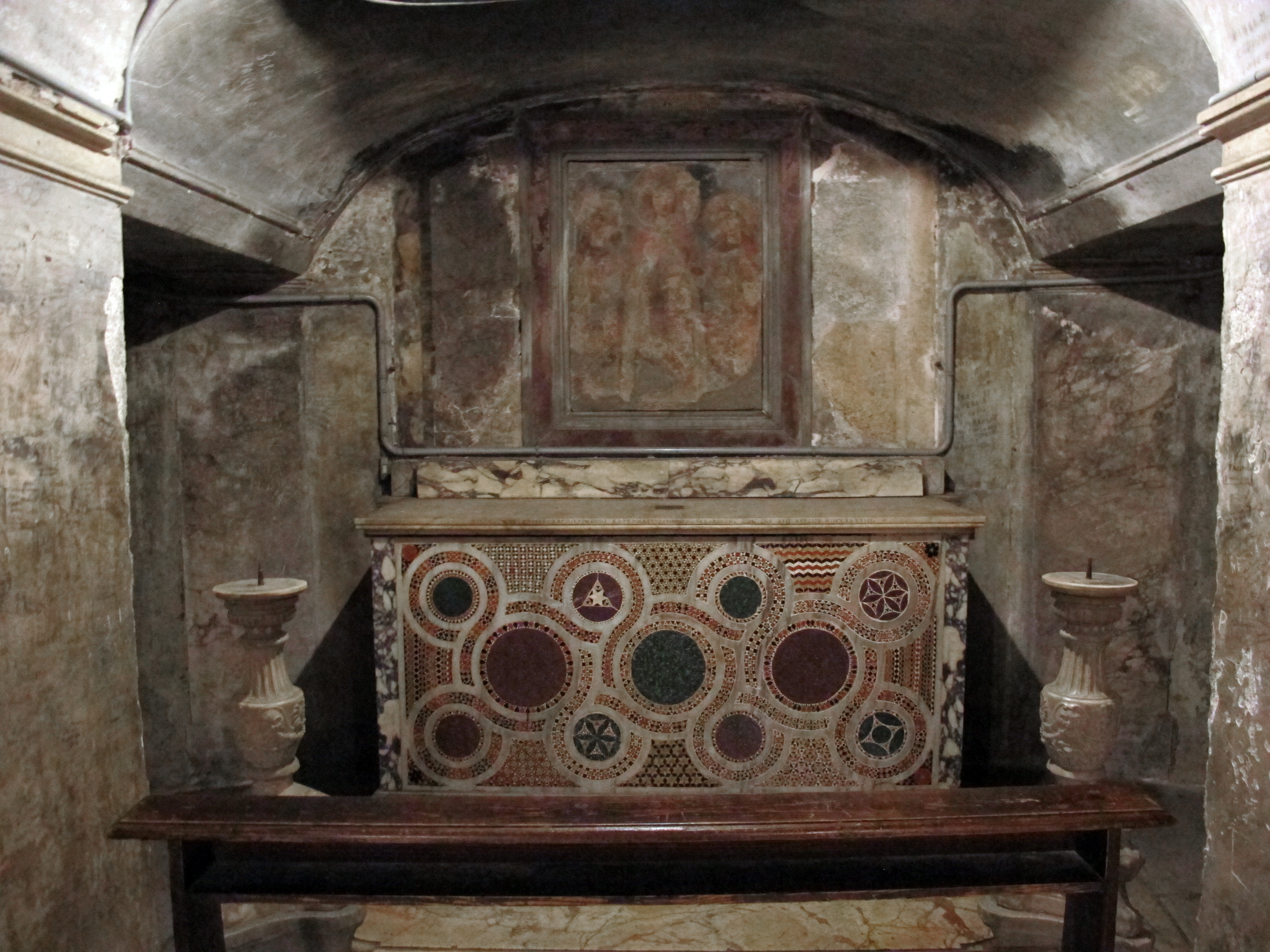 Santa prassede, cripta